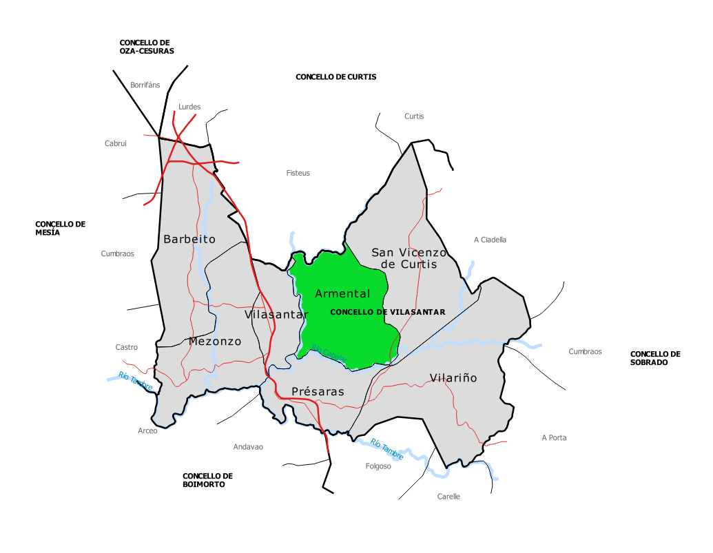 Mapa da parroquia de Armental no concello de Vilasantar (Galiza).